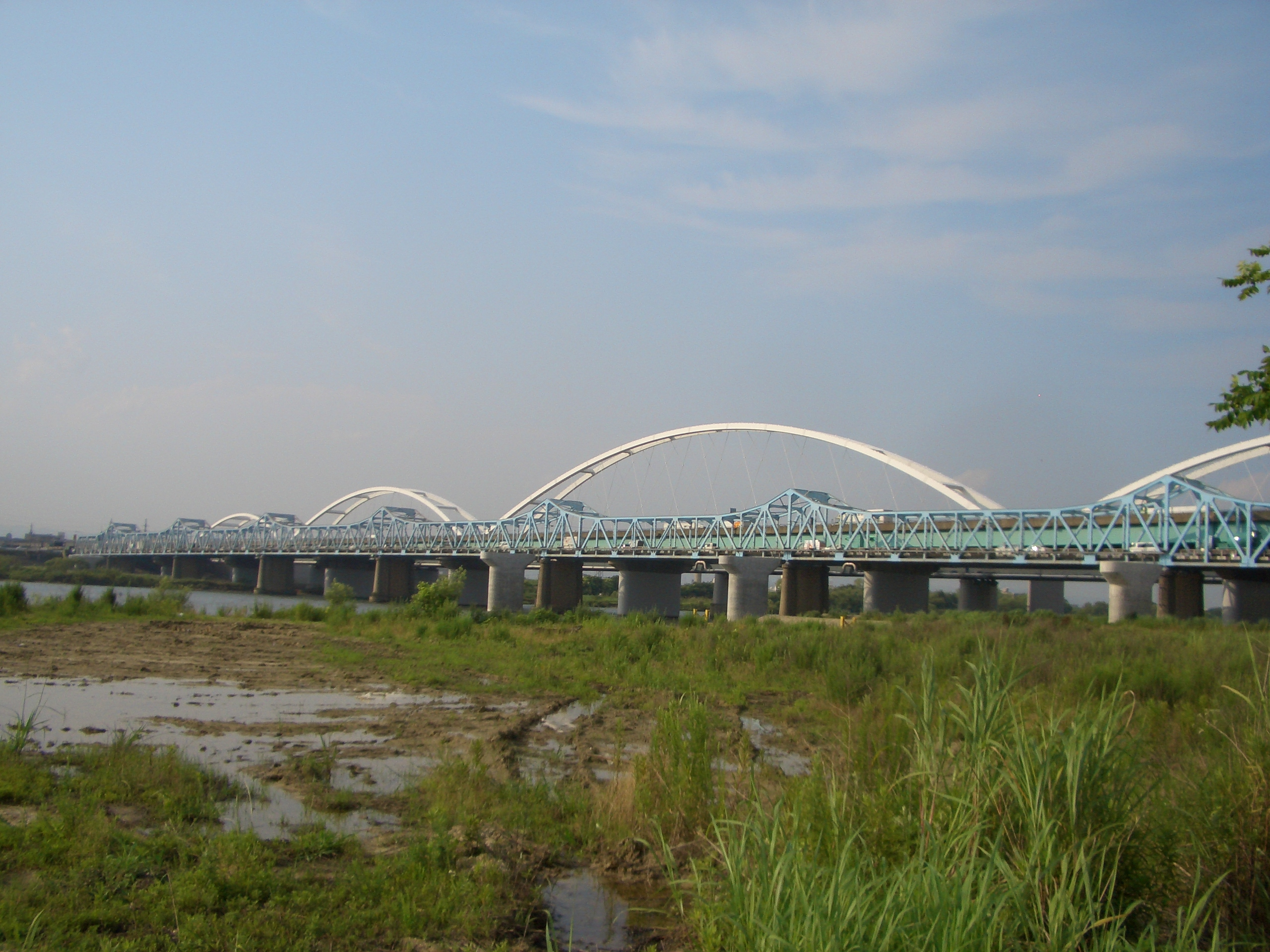 Torikai-ohhasi （Torikai-big-Bridge） 鳥飼大橋